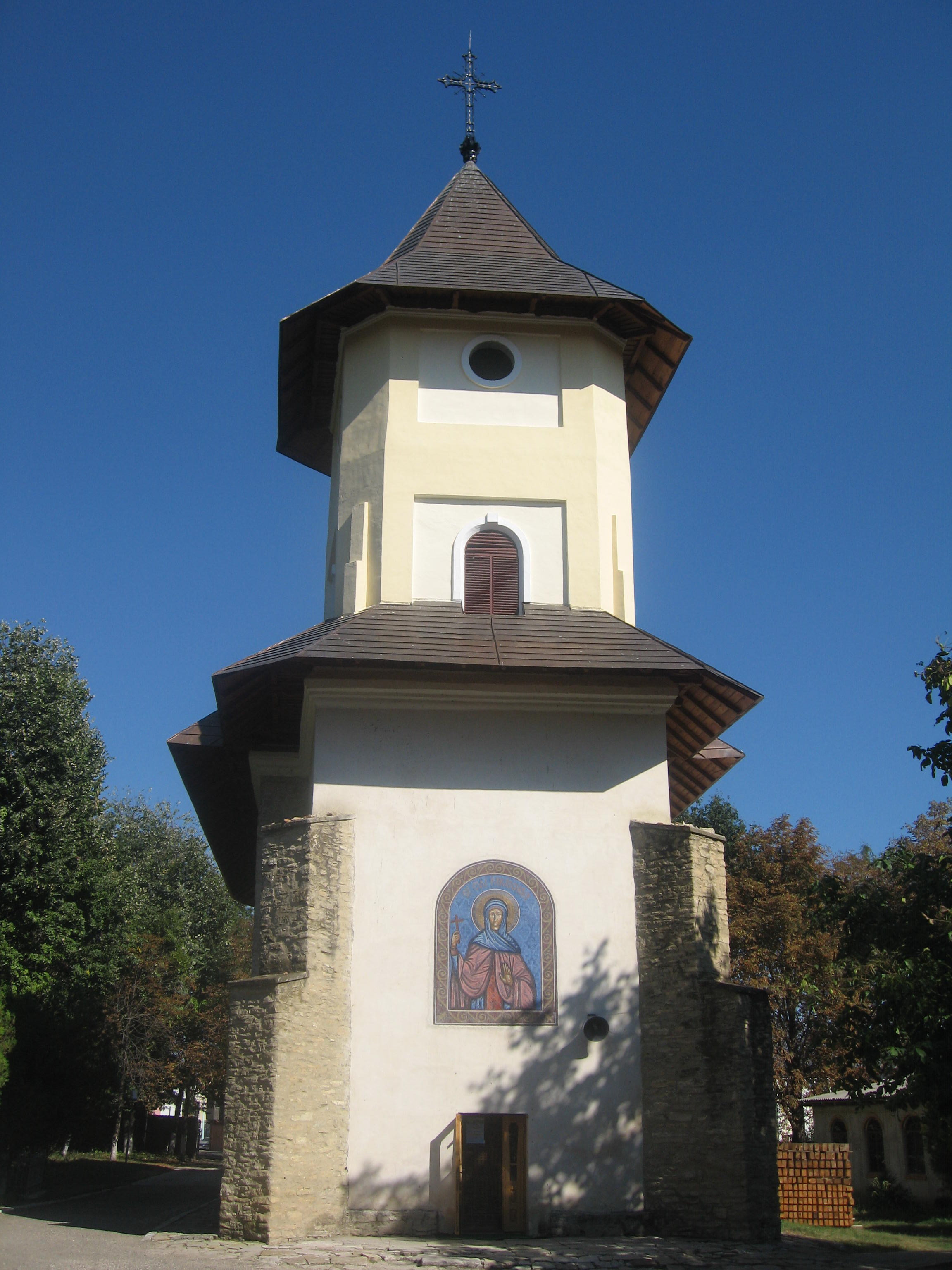 Biserica Sf. Parascheva din Târgu Frumos, România